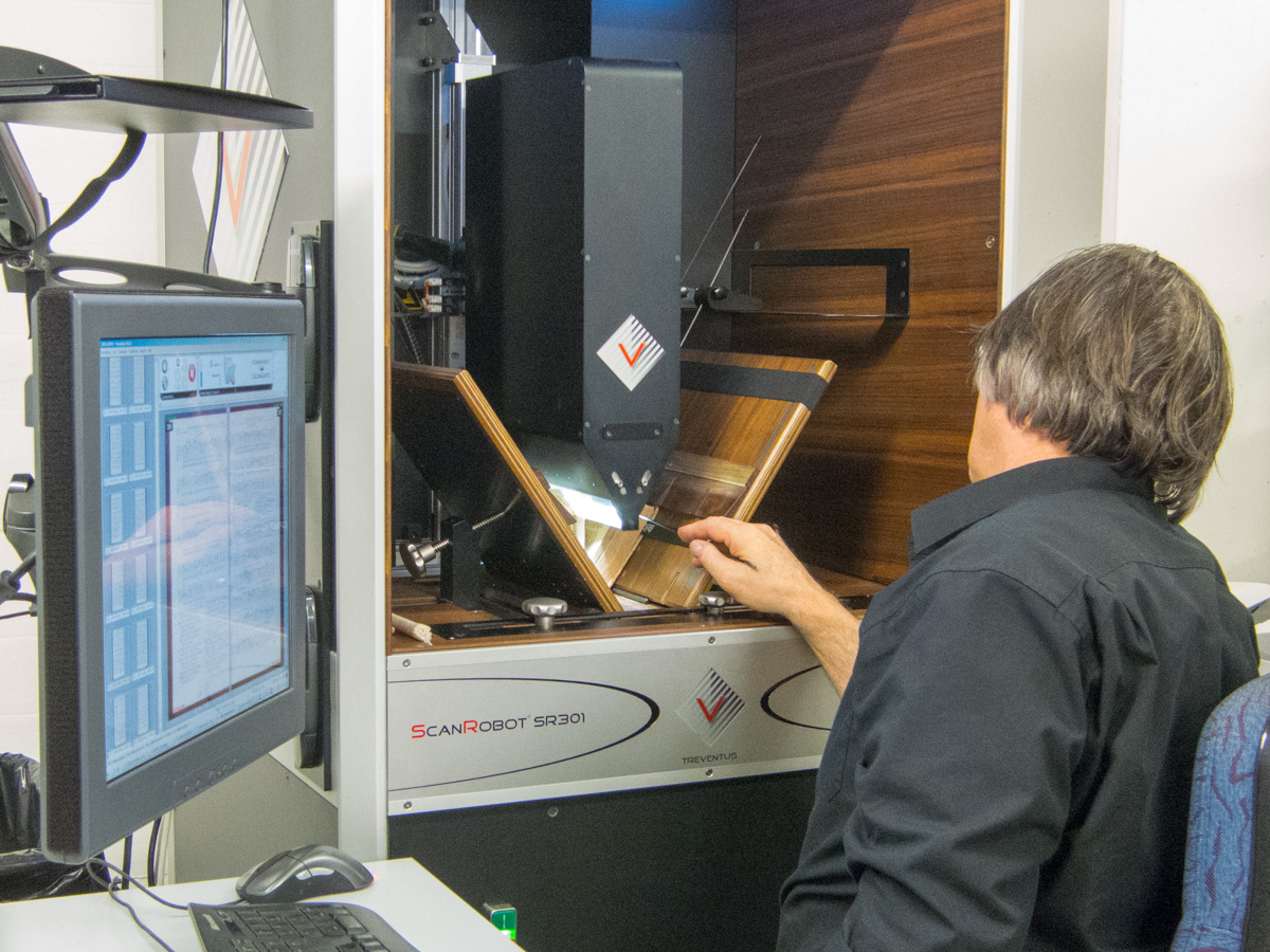 Buch-Scanner im Digitalisierungszentrum der Zentralbibliothek Zürich (Treventus ScanRobot SR301)